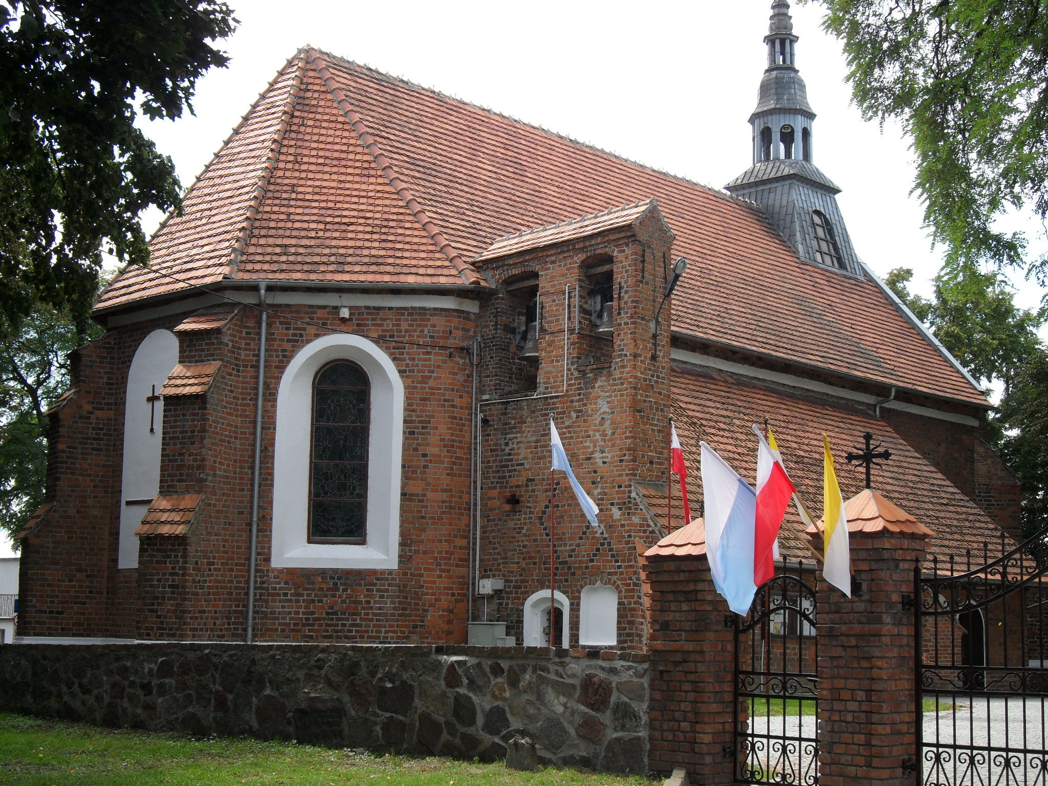 Chrzypsko Wielkie, gotycki kościół pw. św.Wojciecha (bud.1600-09